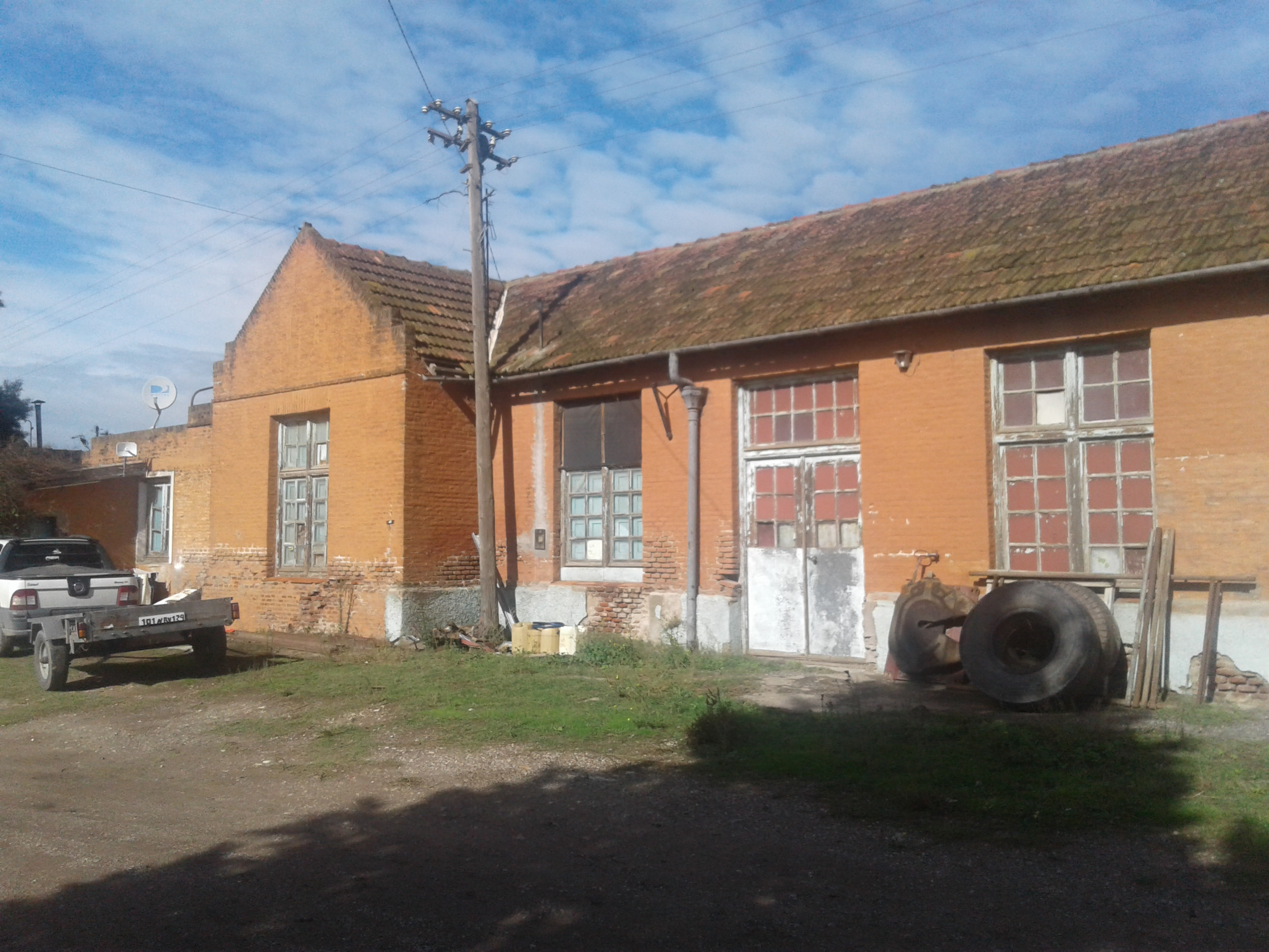 Vista norte del edificio principal de la estación.